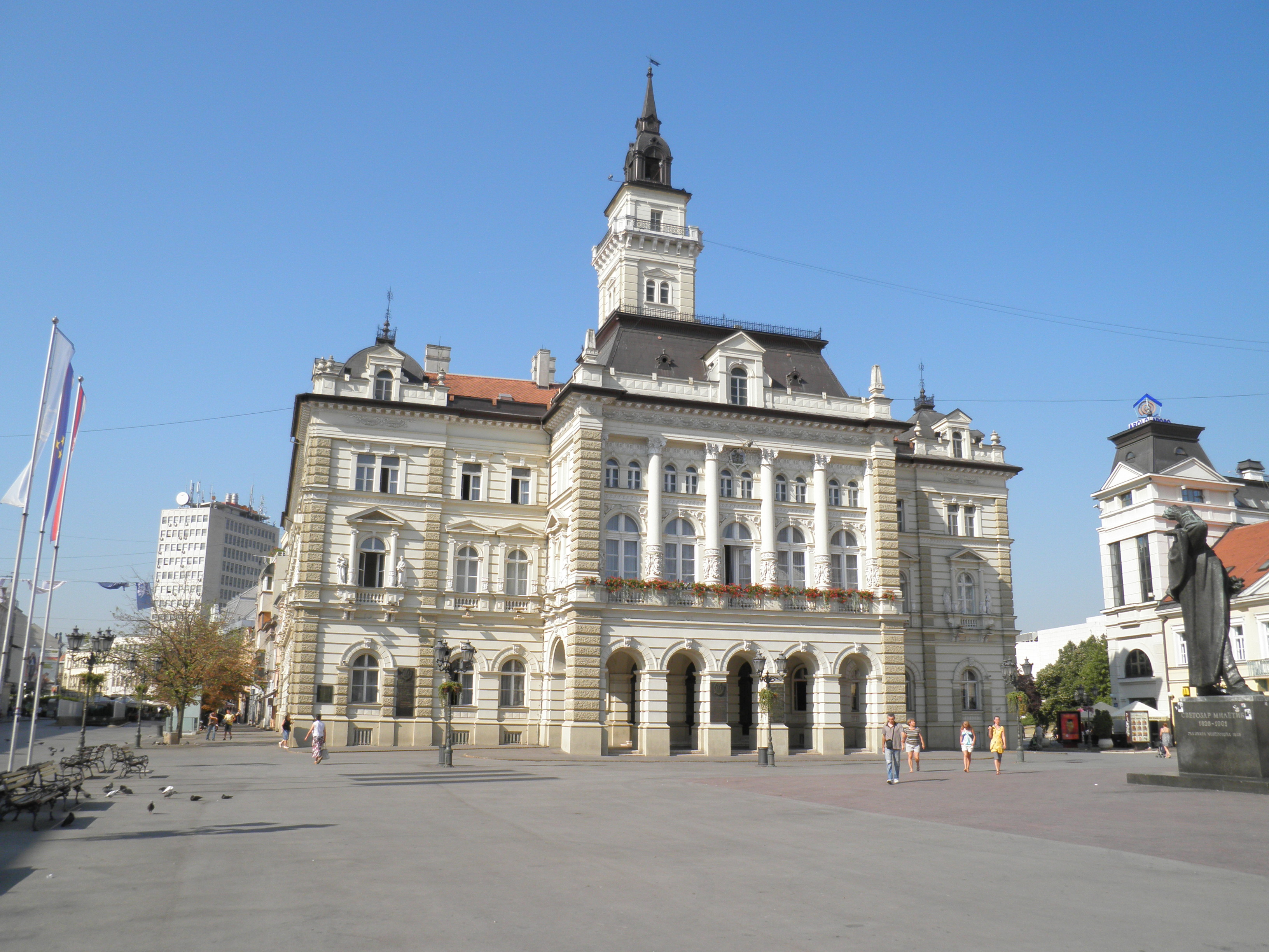 Gradska kuća